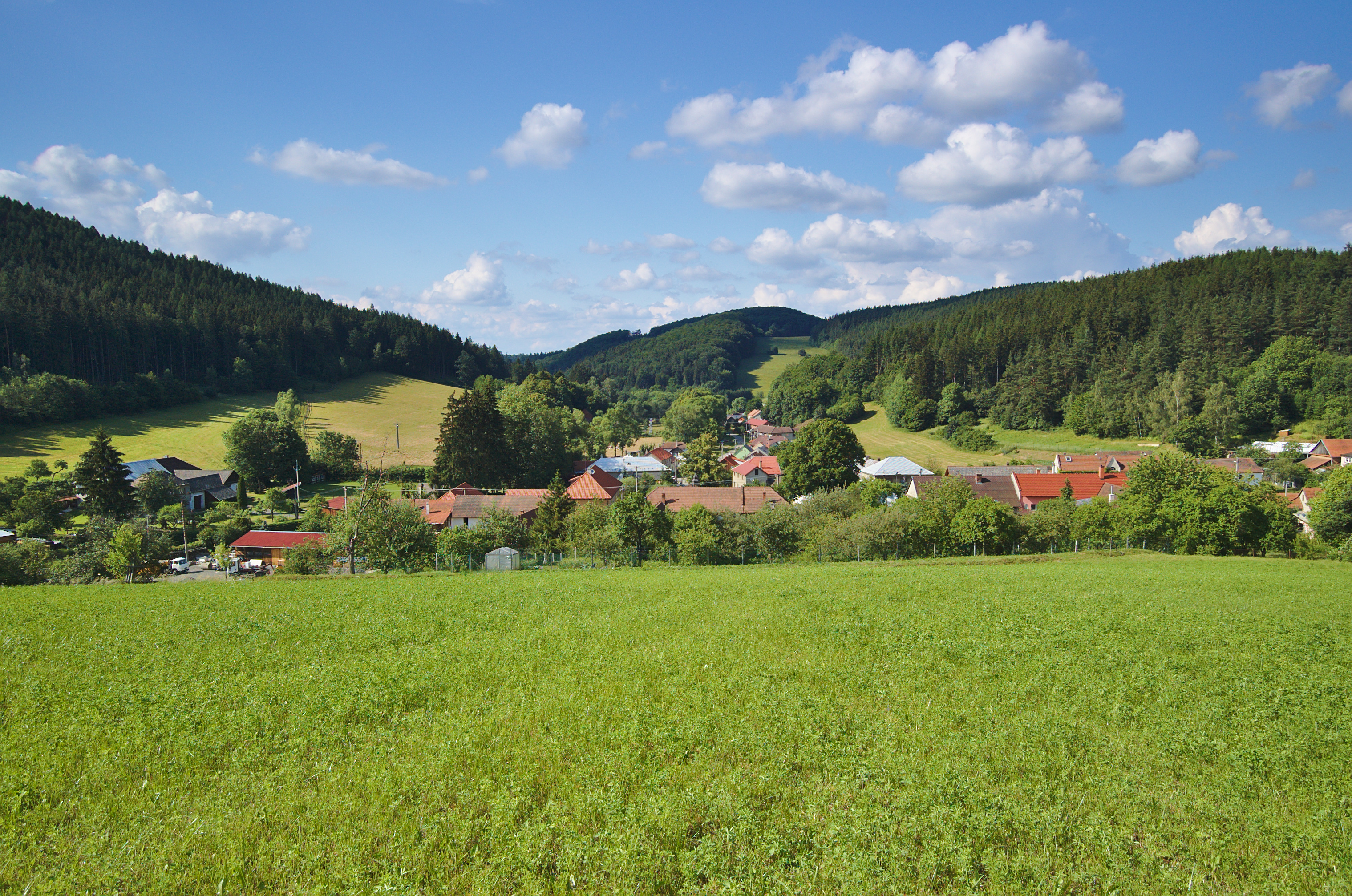 Pohled na obec od jihu, Vojtěchov, Hvozd, okres Prostějov